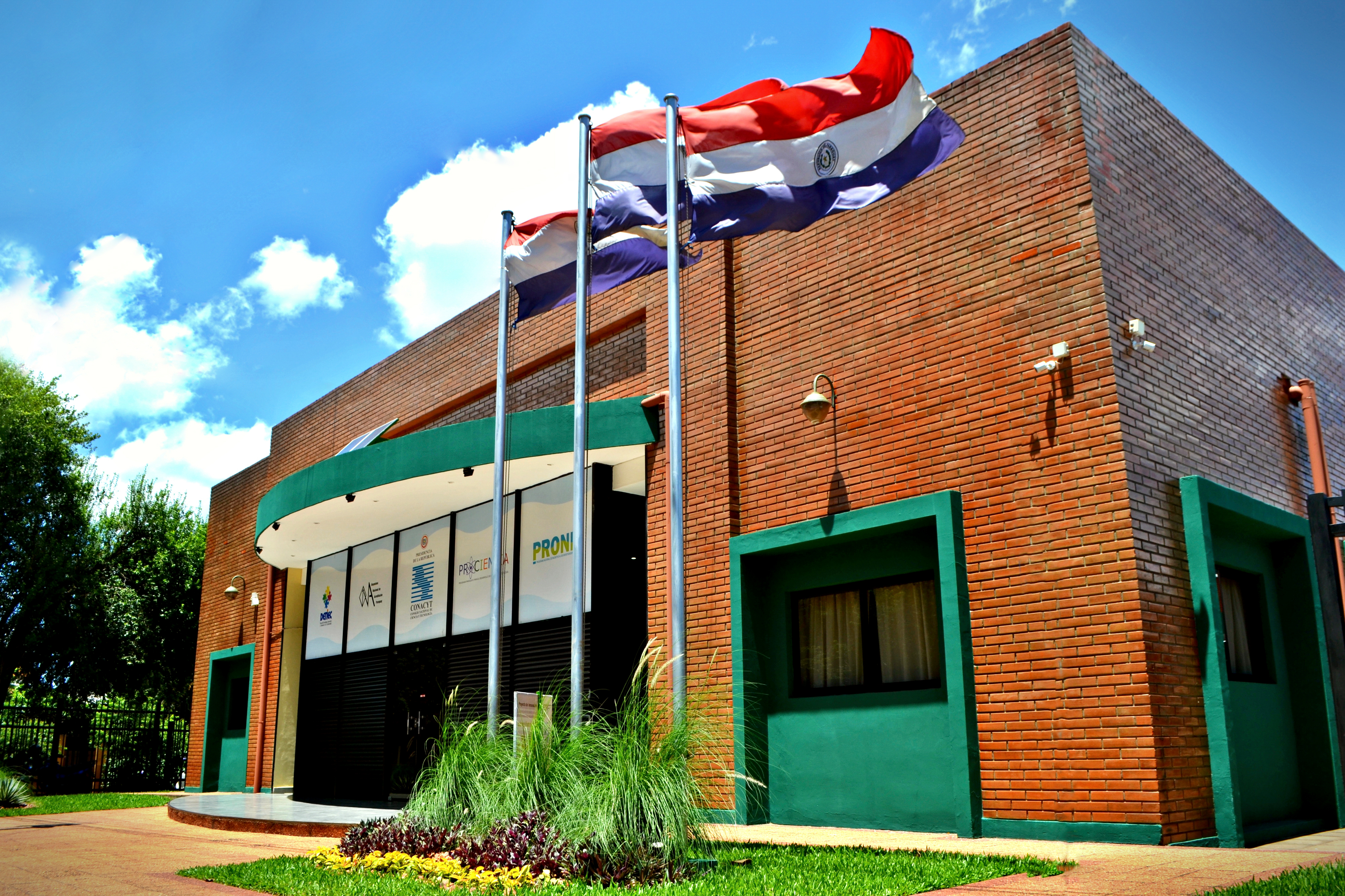 SEDE 1: Dr. Justo Prieto N° 223 entre Teófilo del Puerto y Nicolás Billof, Villa Aurelia.